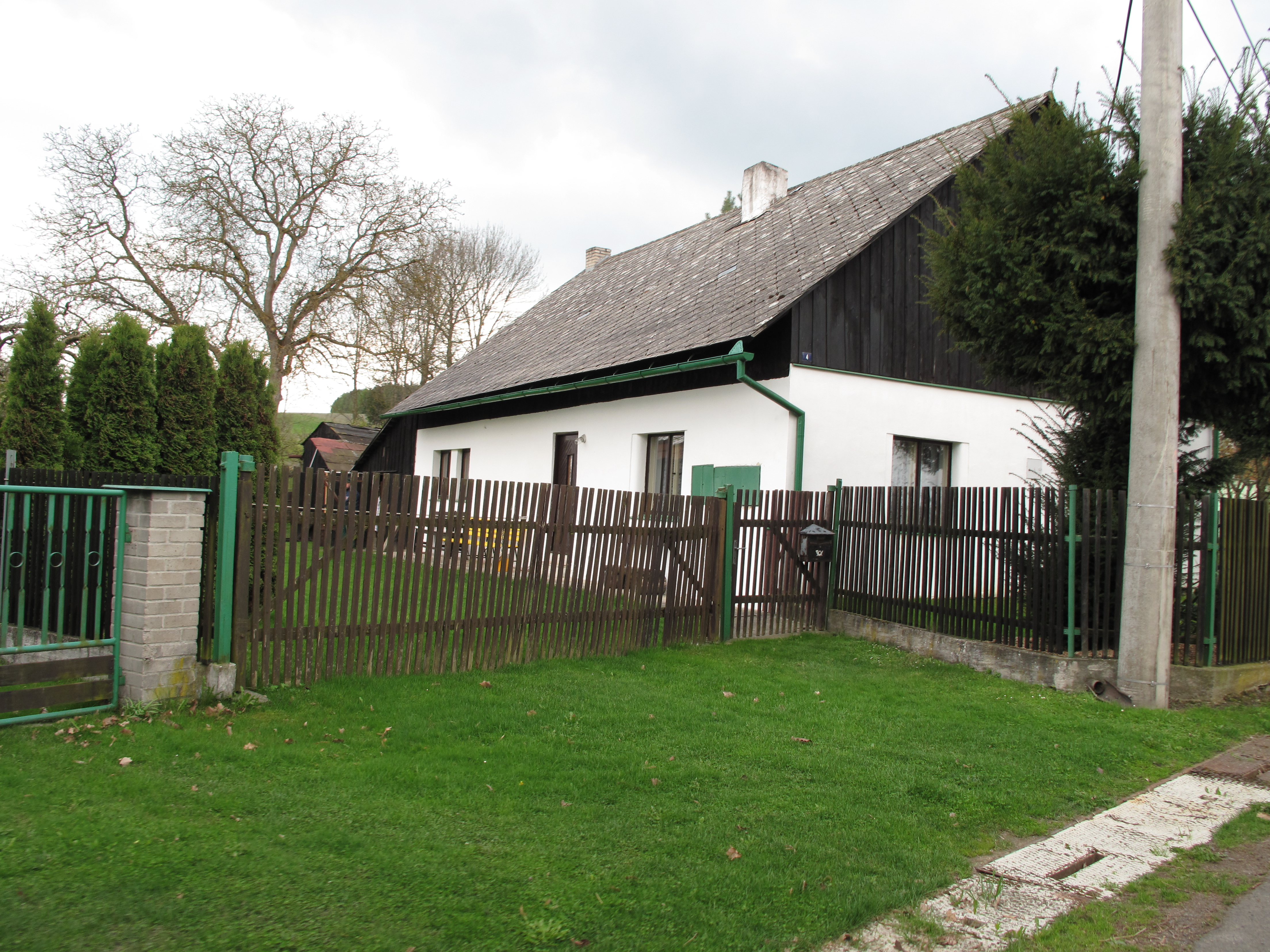 Nevděk (Černíkov). Okres Klatovy, Česká republika.